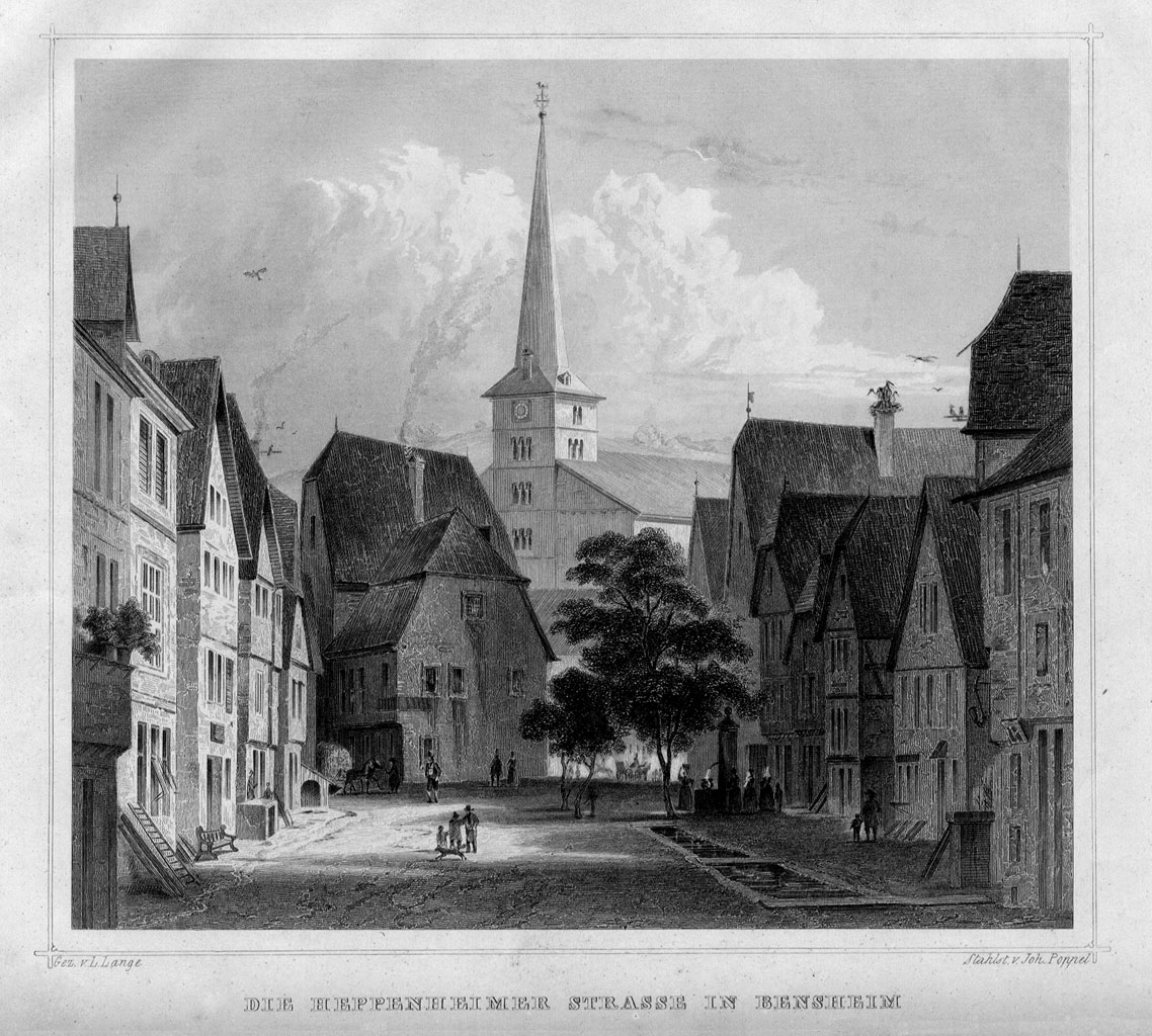 Ansicht von Bensheim, 1849, Stahlstich auf Papier, schwarz-weiß